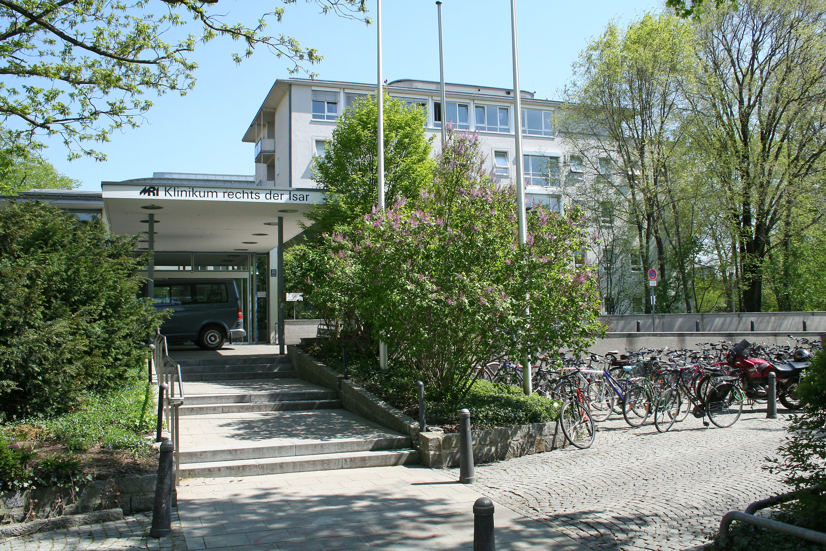 Haupteingang des Klinikums rechts der Isar in München, Ismaninger Straße